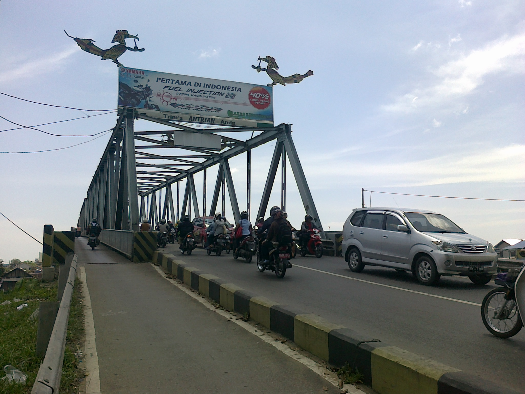 Jembatan Kapuas di Kota Pontianak dari sisi Pontianak Timur, dibagun pada 1980 dengan panjang 420 m dan diresmikan oleh Presiden Soeharto pada 1982.